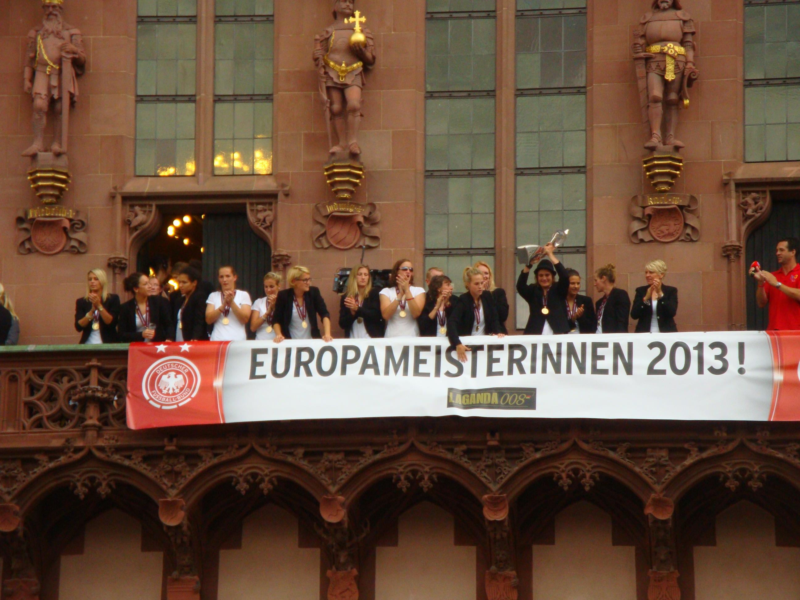 Feier in Frankfurt